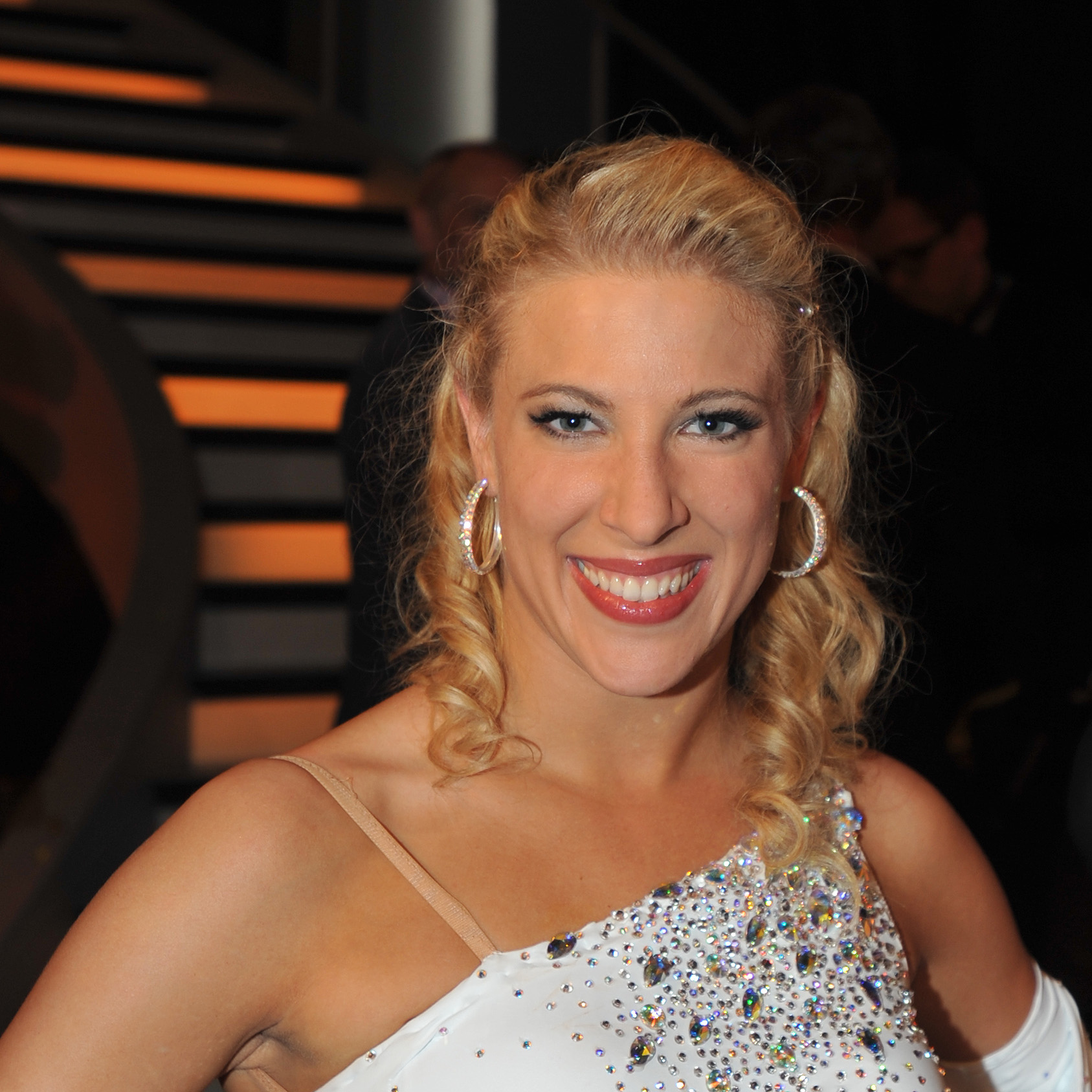 "Dancing Stars" am 16. Mai 2014: Maria Santner